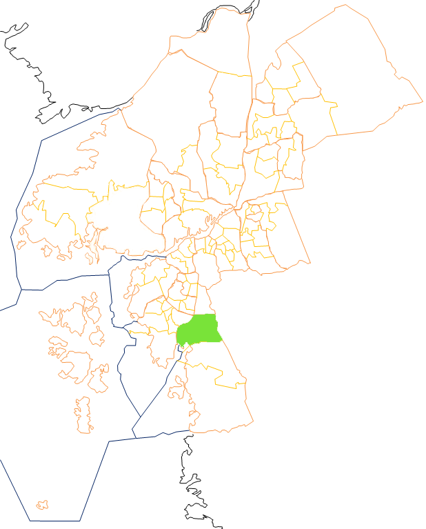 Karta som visar primärområdes belägenhet i Göteborg